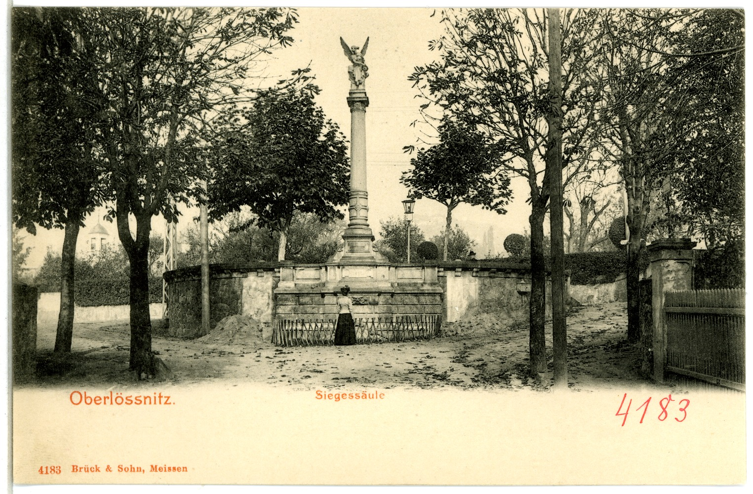 Oberlößnitz; Siegessäule This postcard is from publisher Brück & Sohn in Meißen ( postcard has a unique number 04183 and is available in a higher resolution at the publisher. This images was uploaded in a cooperation project between Wikipedians and the publisher.